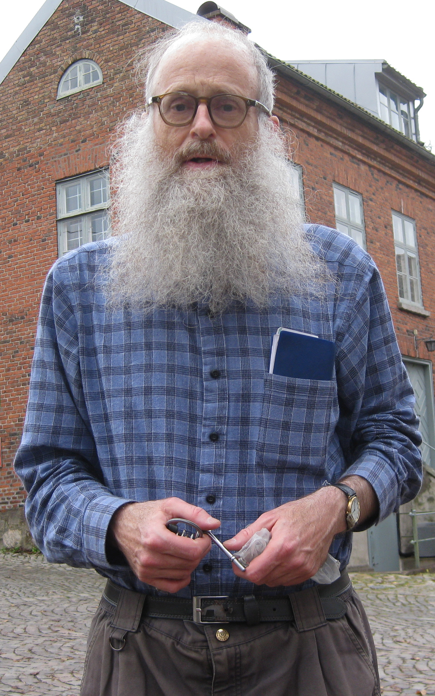 Lars Gahrn utanför Mölndals hembygdsgård.